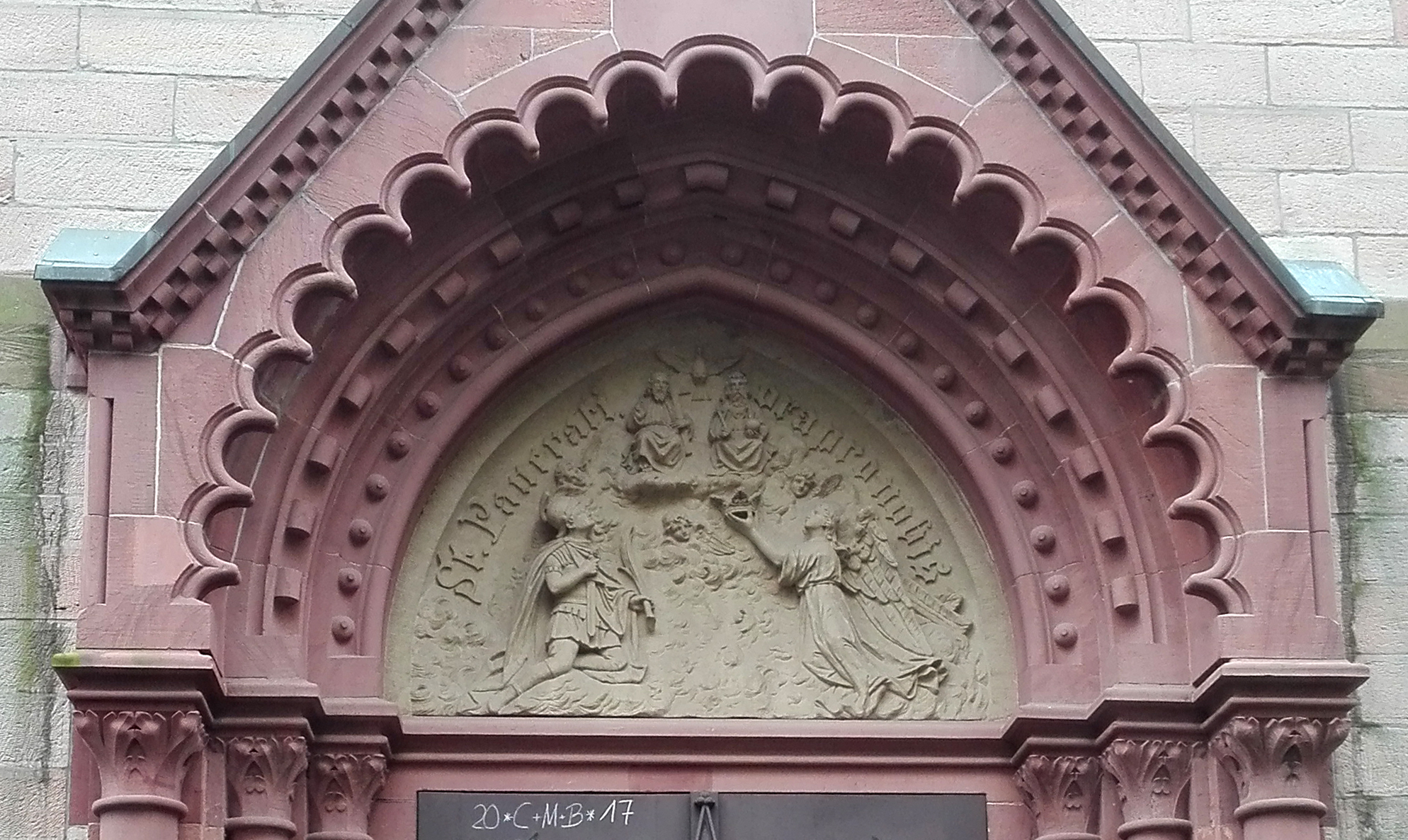 Neugotische Tympanongestaltung des Nordportals an der Pfarrkirche St. Pankratius (Offenbach-Bürgel)